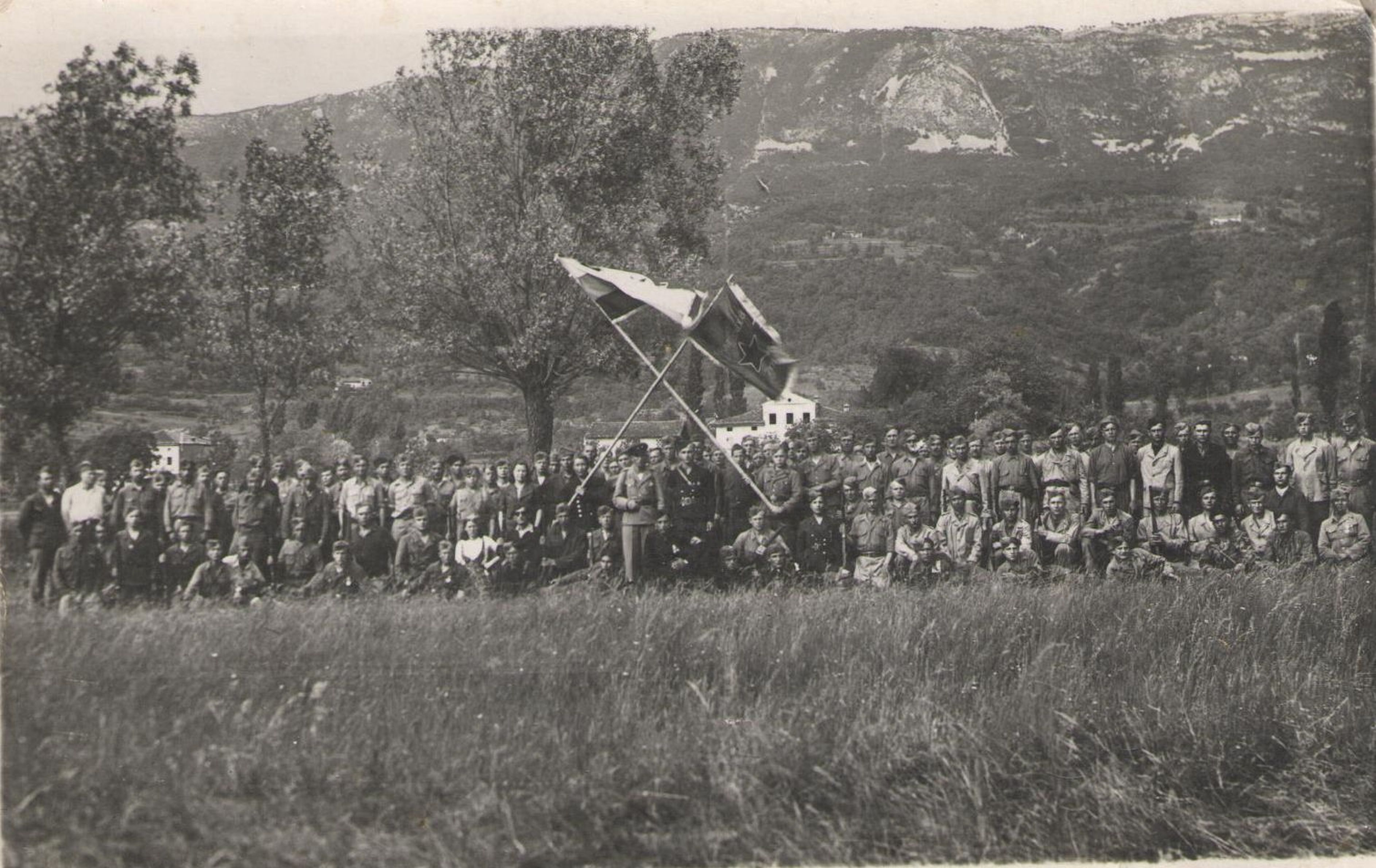 Skupina borcev 1. Ruske brigade Narodnoosvobodilne vojske Jugoslavije, Šempas, Slovenija, maj 1945.